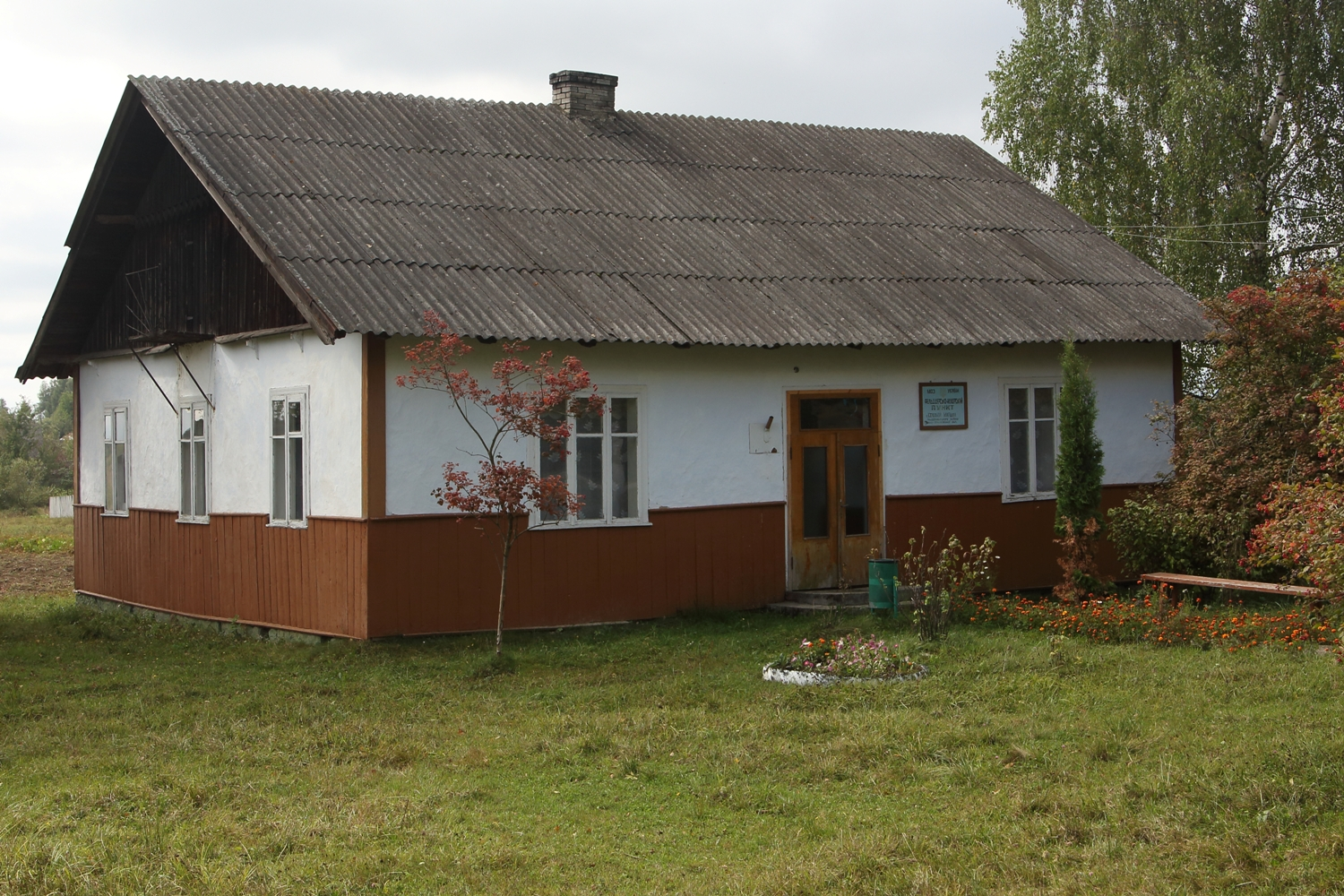 Фельдшерсько-акушерський пункт у с. Середній Майдан, Надвірнянський район